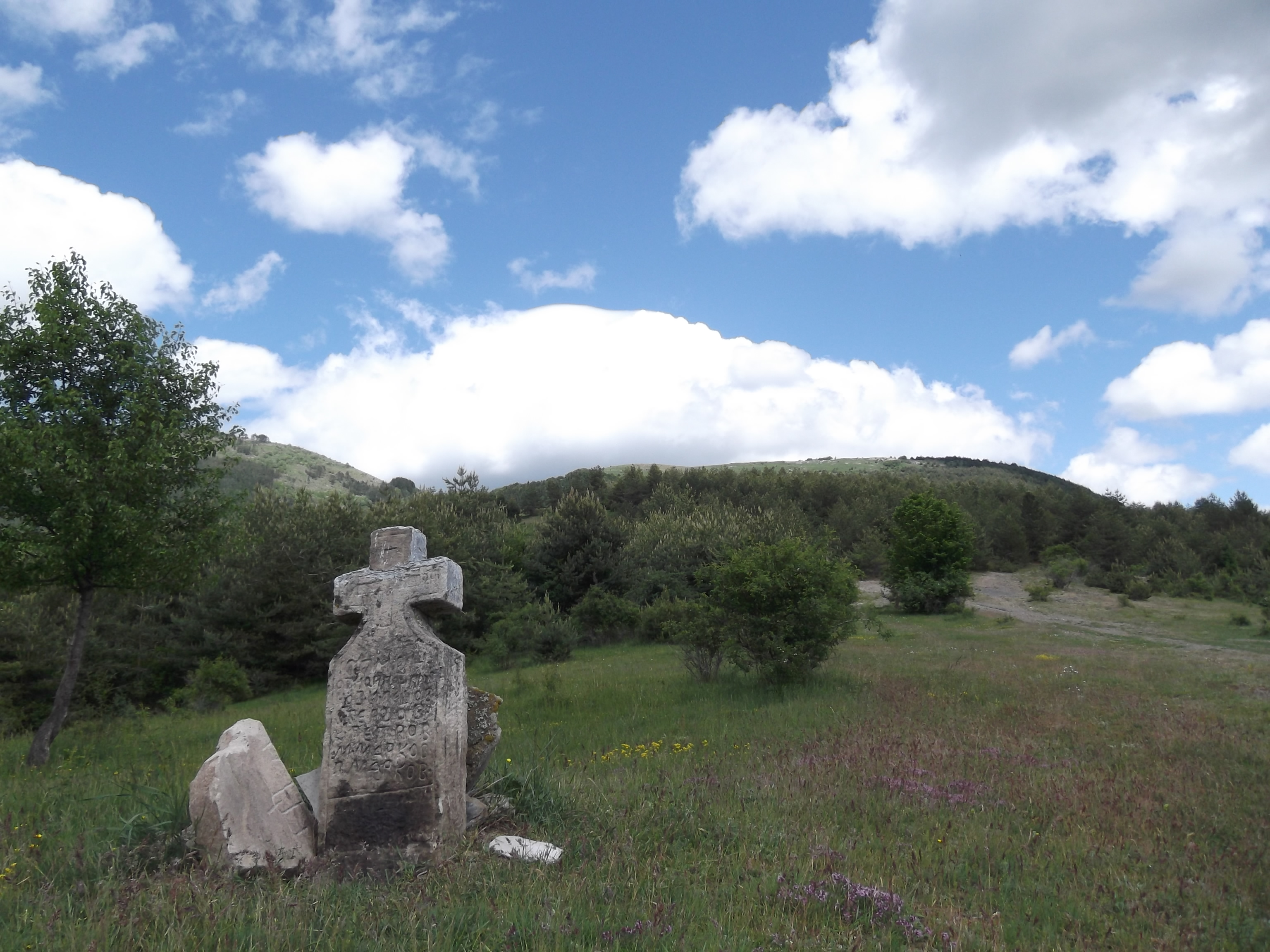 Местността Припор с курбан на Св. Илия, село Лесковдол. На заден план се вижда вр. Издремец.